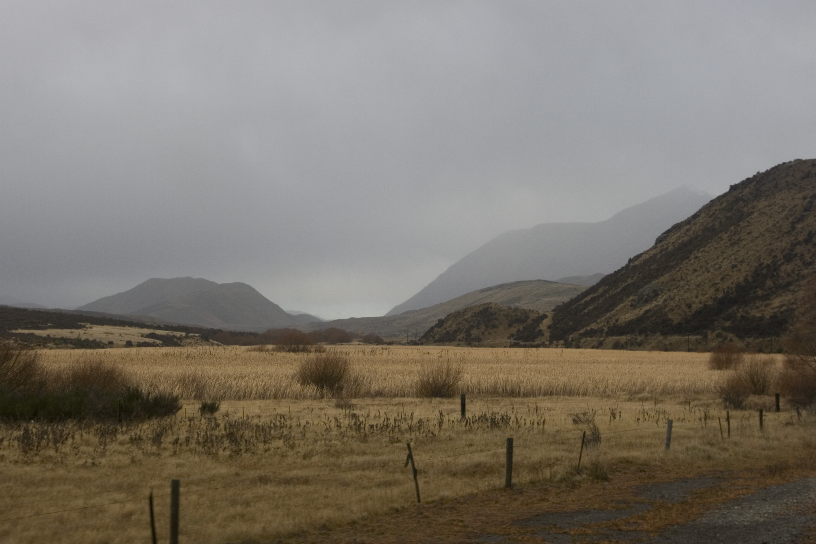 TranzAlpine train trip